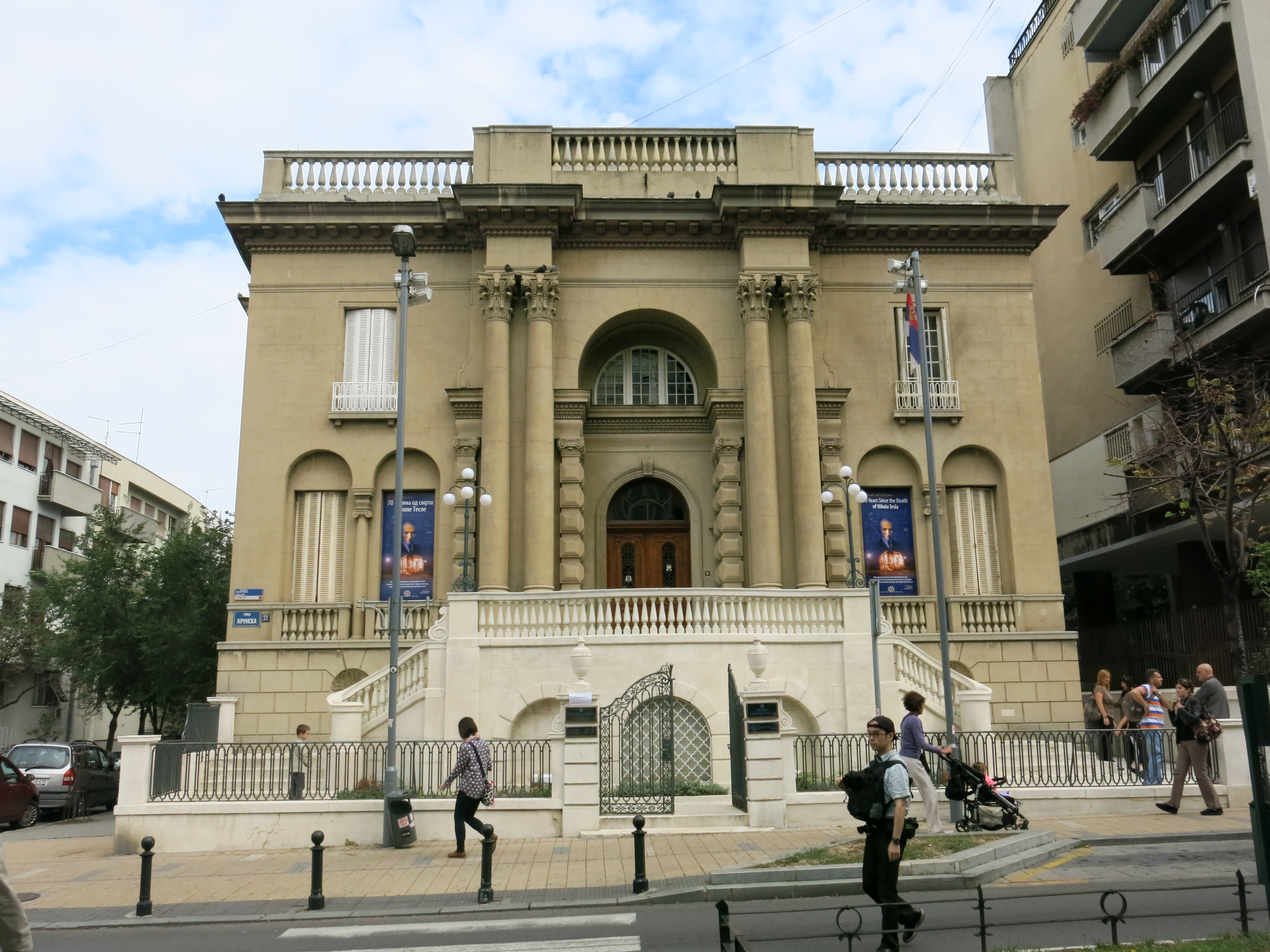 Генчићева кућа